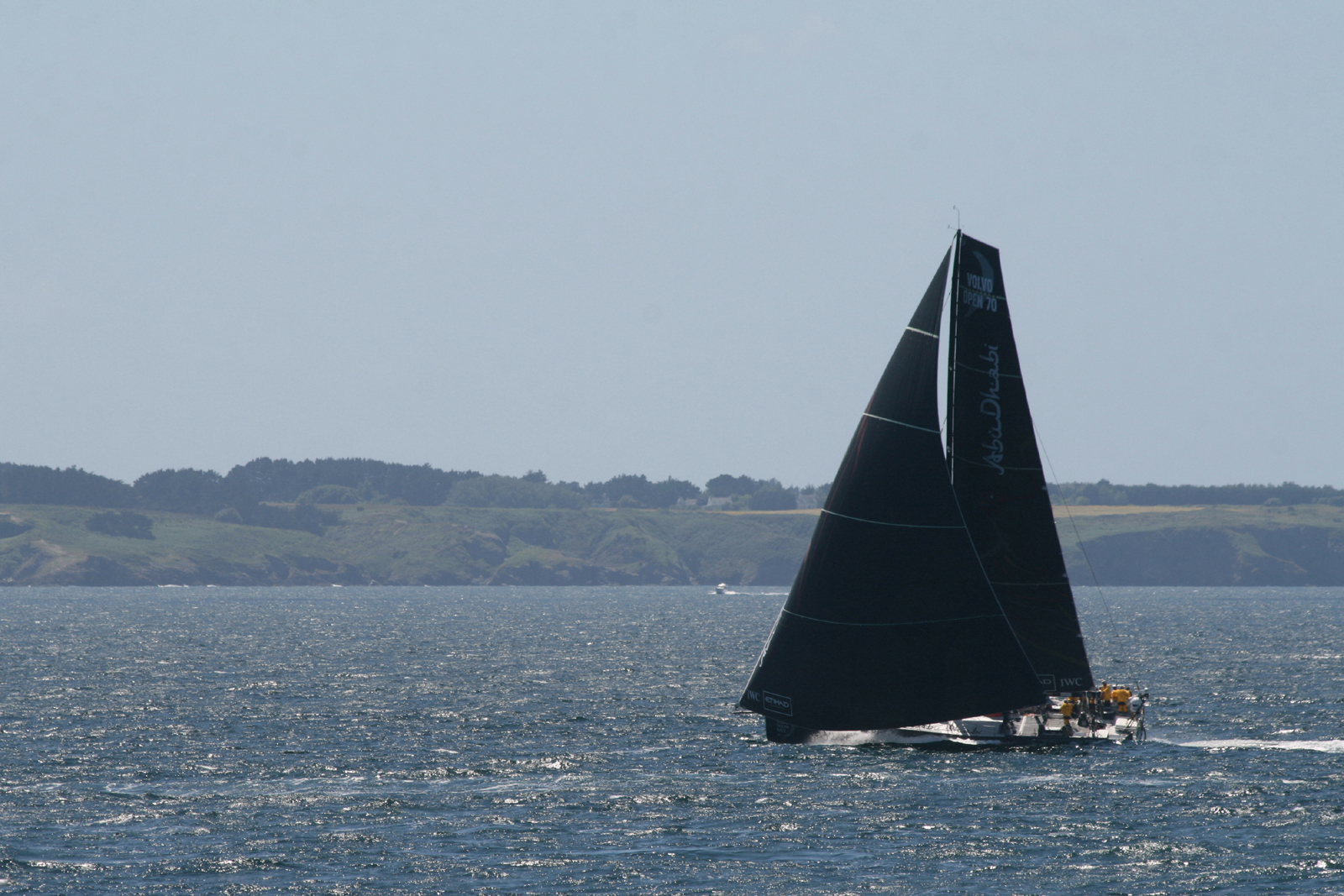 Abu Dhabi durant la Volvo Ocean Race devant Belle-Ile